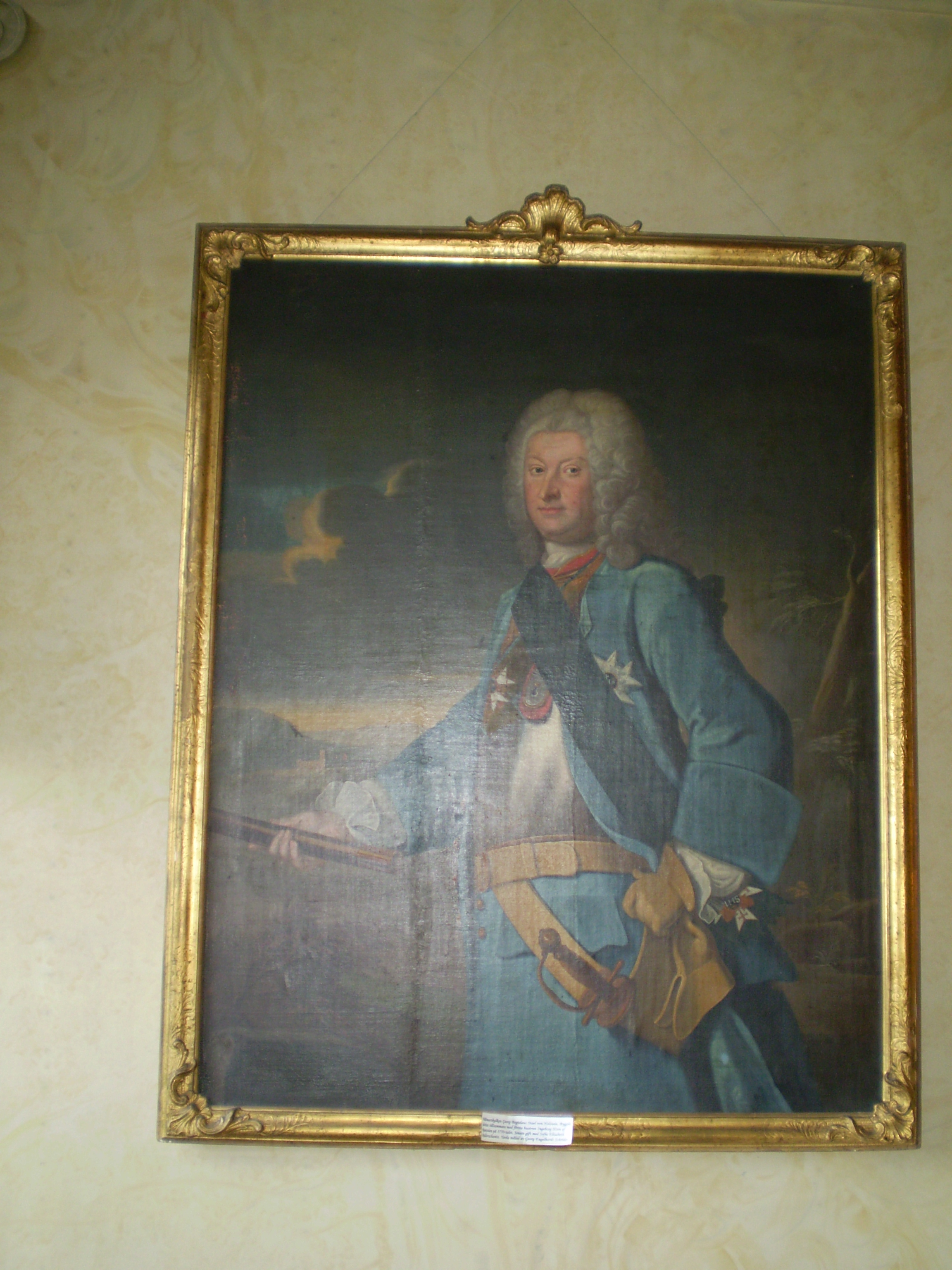 Portrait of Georg Bogislaus Staël von Holstein (1685-1763)label QS:Len,"Portrait of Georg Bogislaus Staël von Holstein (1685-1763)"